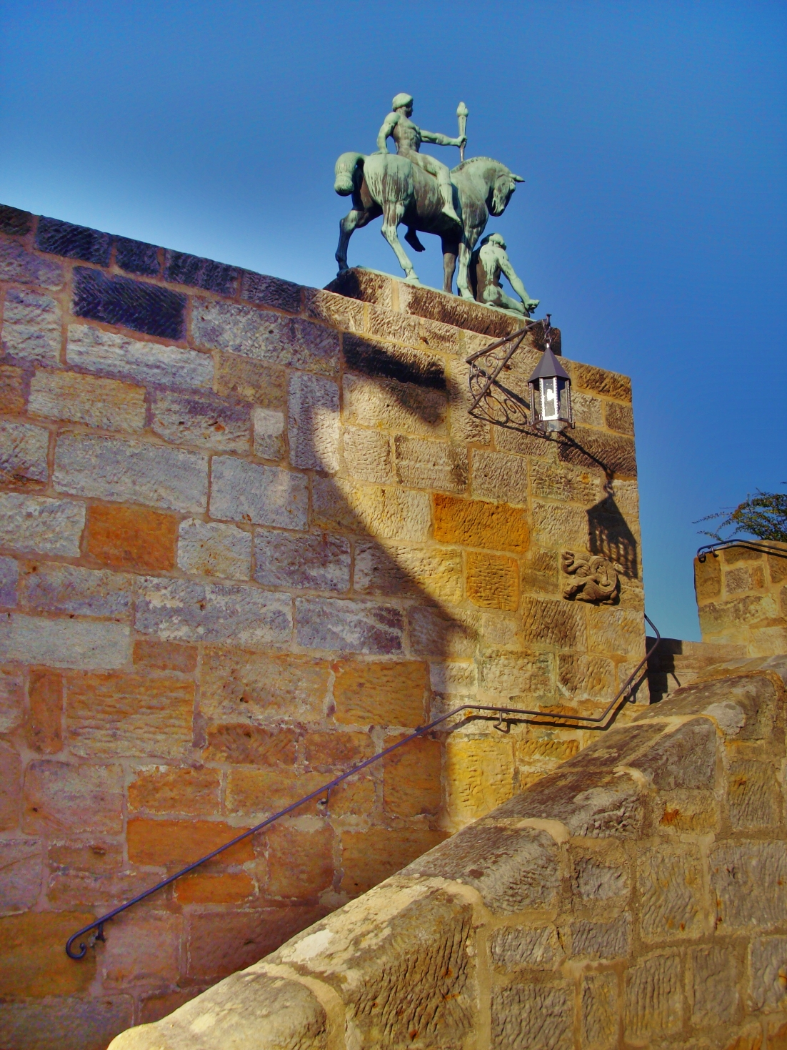 Lutherdenkmal auf der Veste Coburg, Skulptur Licht und Kraft (Lichtbringer zu Pferde, 1913) von Hans Klett (* 1876)